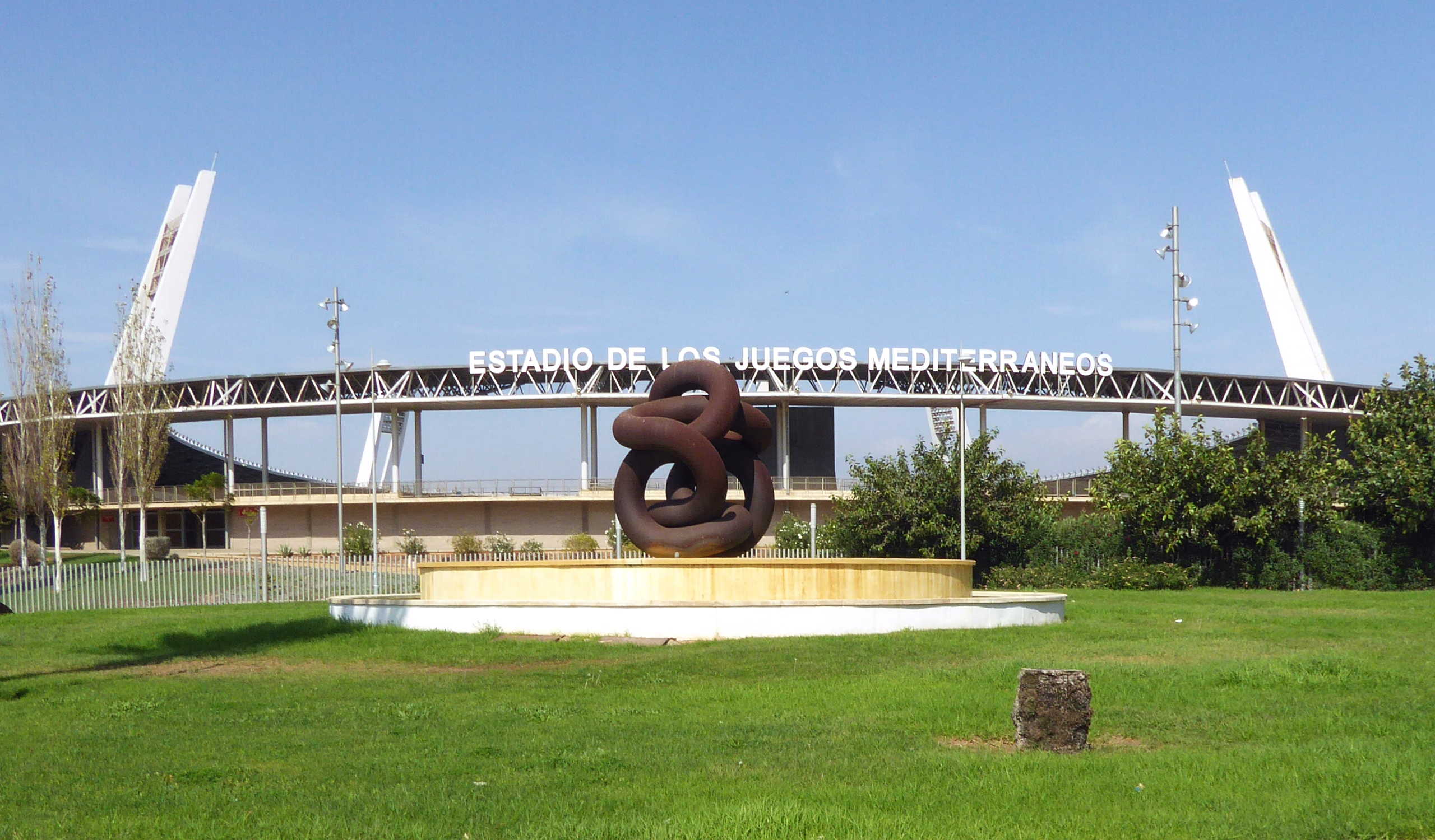 Estadio de los Juegos Mediterráneos Almeria Andalusien Spanien - Foto Wolfgang Pehlemann P1110335